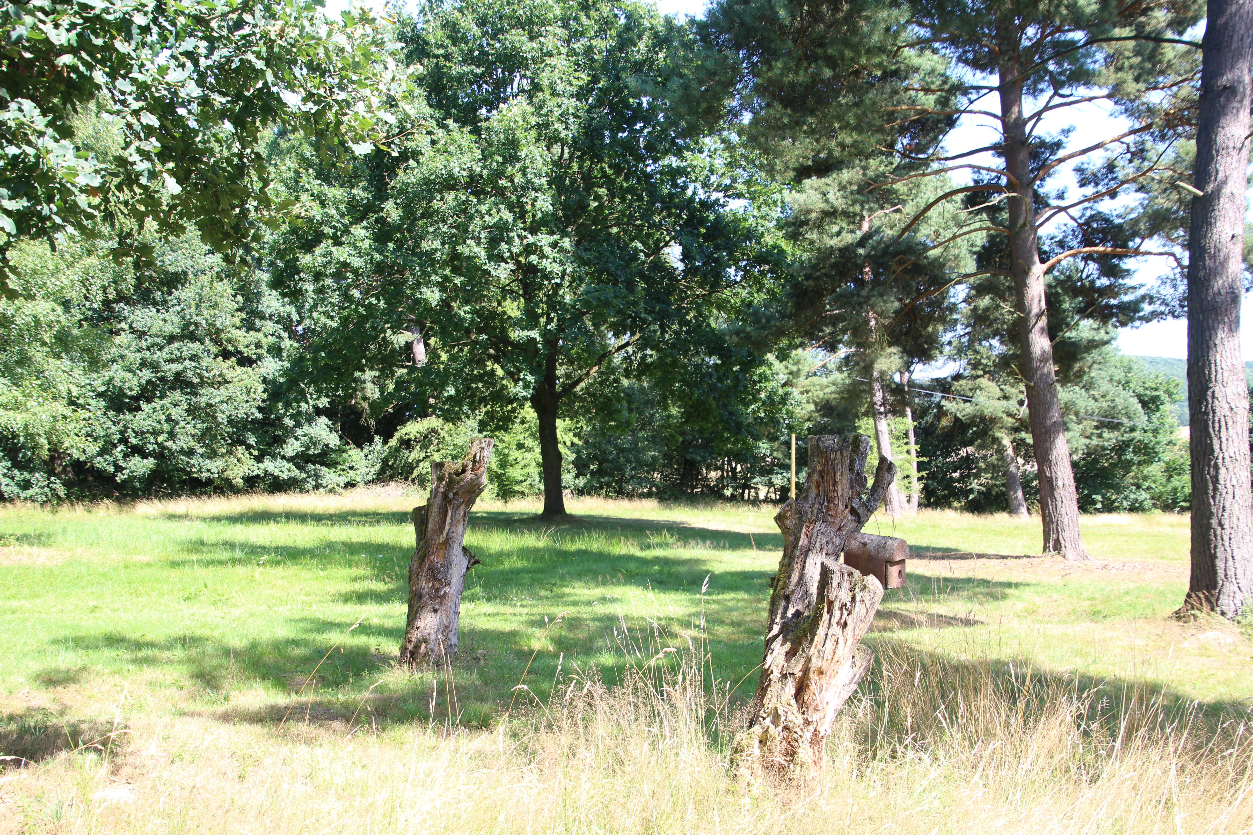 Siehe Bild und Dateiname